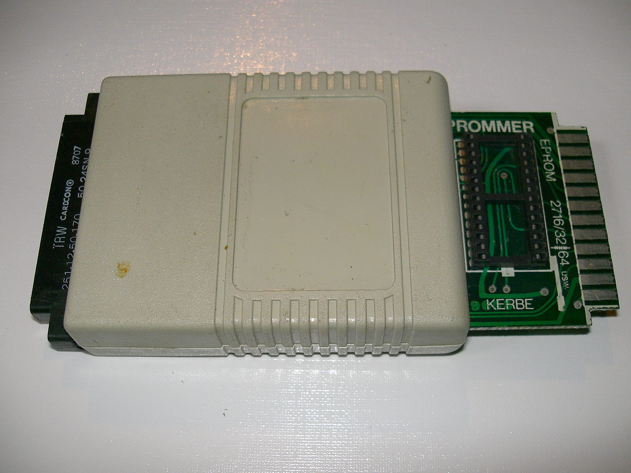 Micro-Maxi-Prommer EPROM-Brenner für den Commodore C64